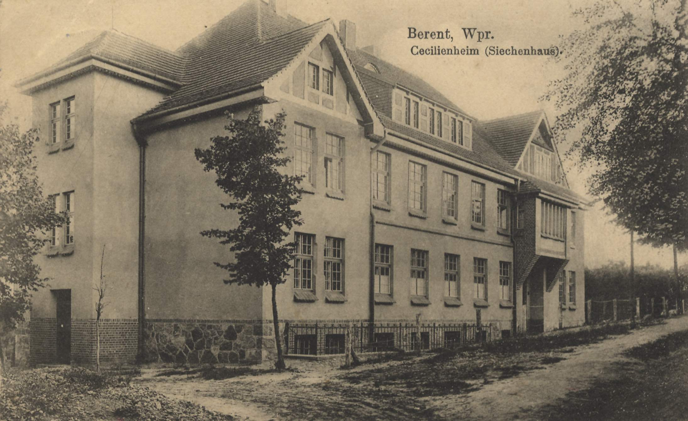 Cecilienheim (Siechenhaus)